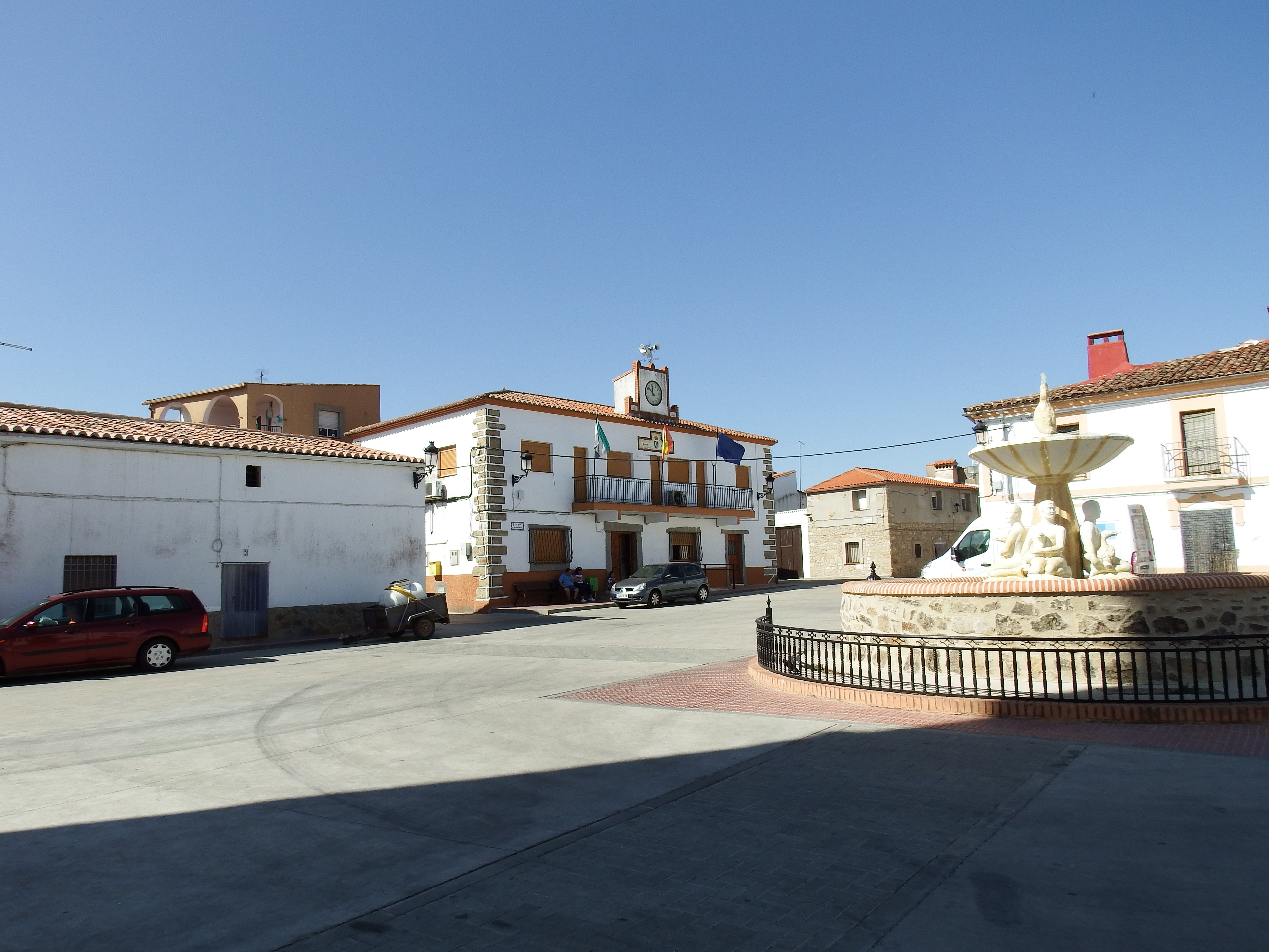 Robledillo de Trujillo